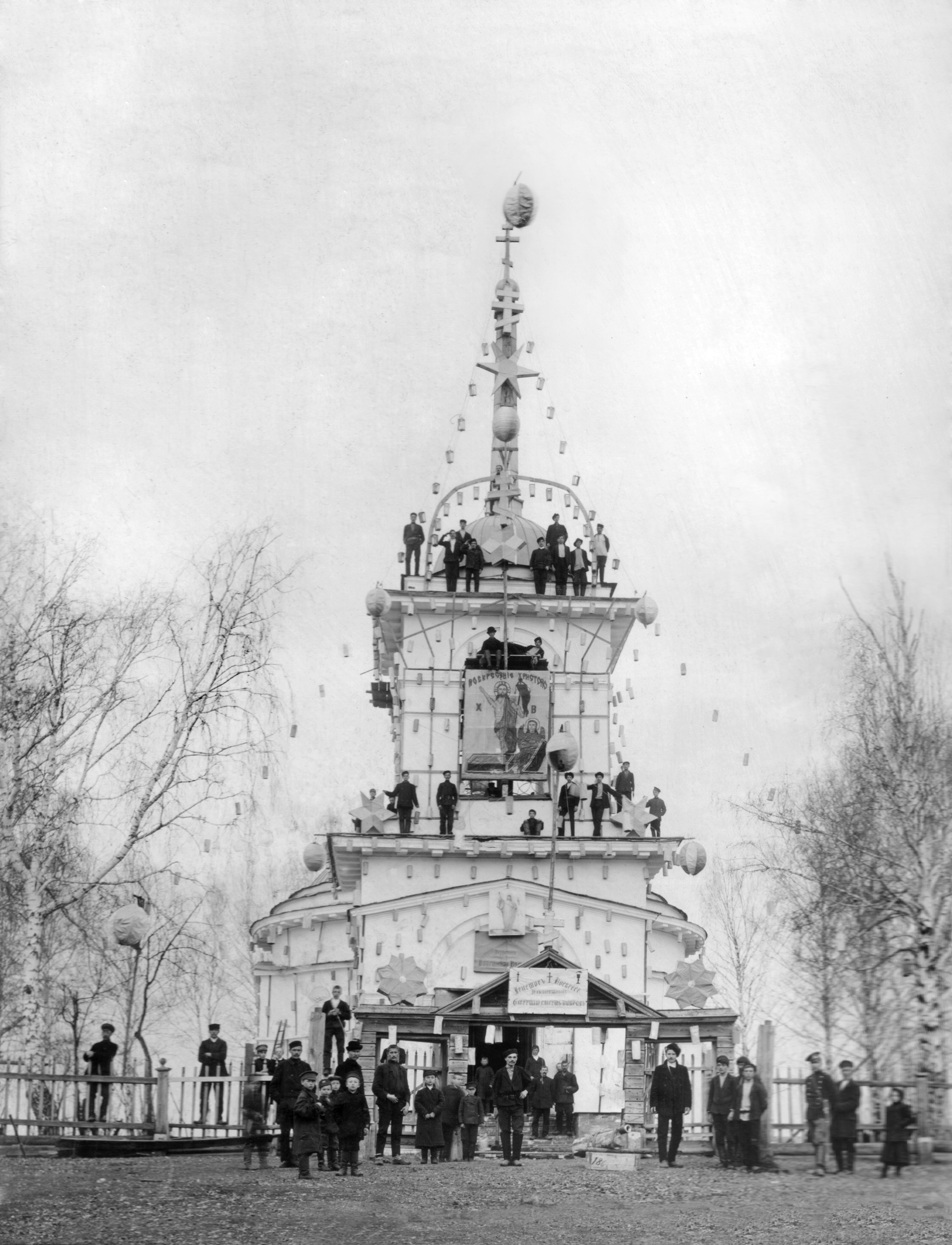 Старая Ертарская церковь